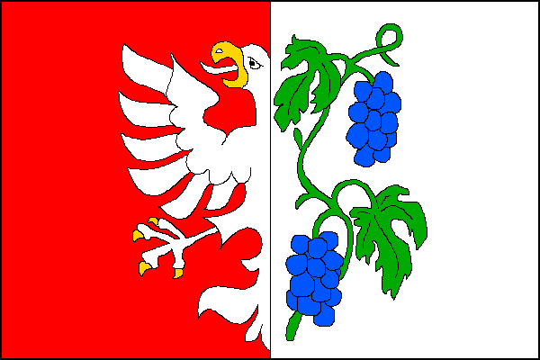 vlajka, Miroslav, okres Znojmo